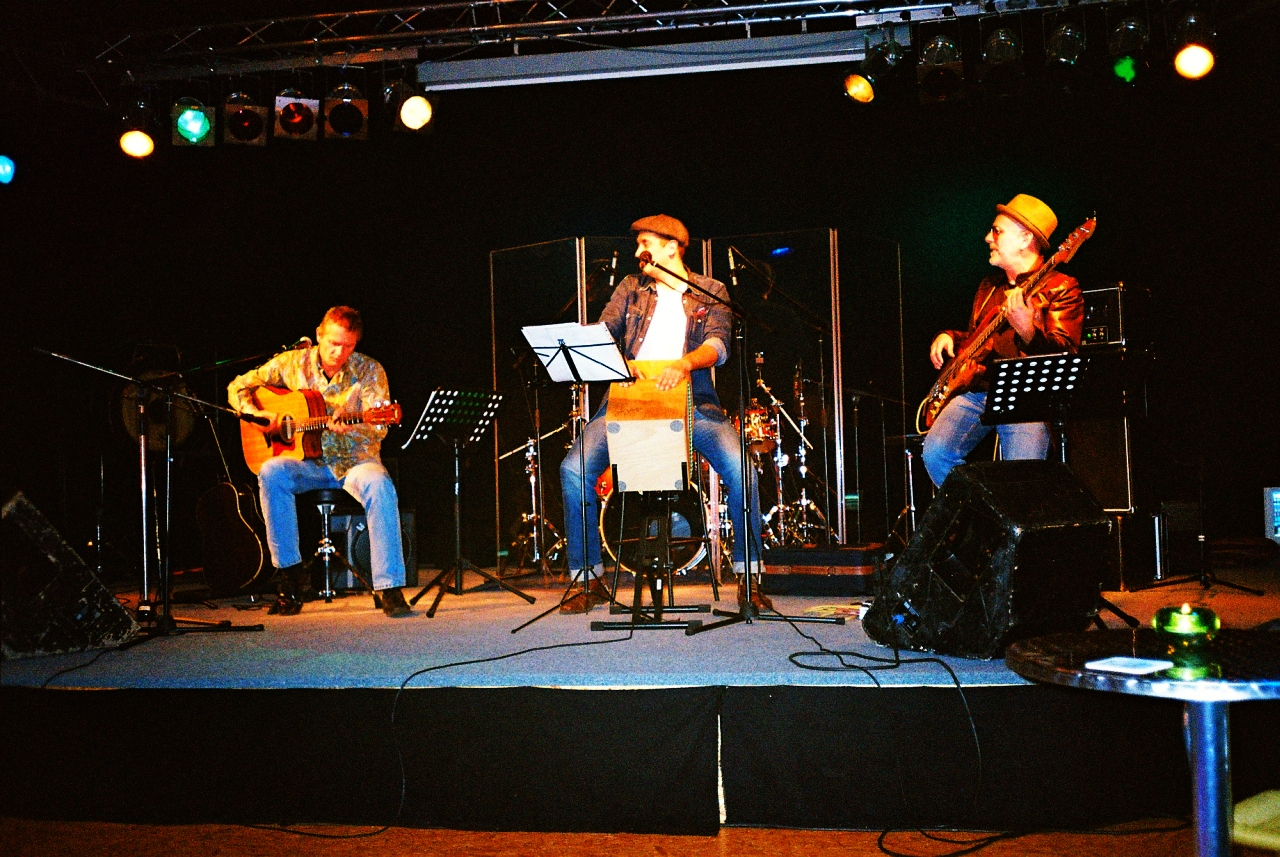 Usuals Suspects in der Studio Lounge Untertrubach am 2. Nov. 2012